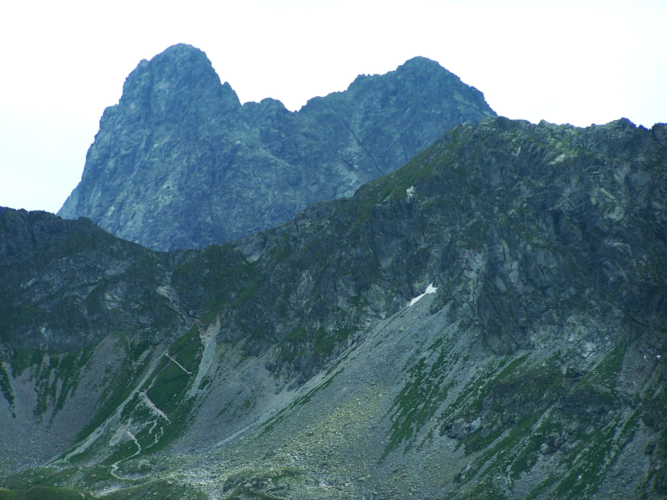 Mięguszowiecki Szczyt, Hińczowa Przełęcz, Cubryna, Szpiglasowy Wierch